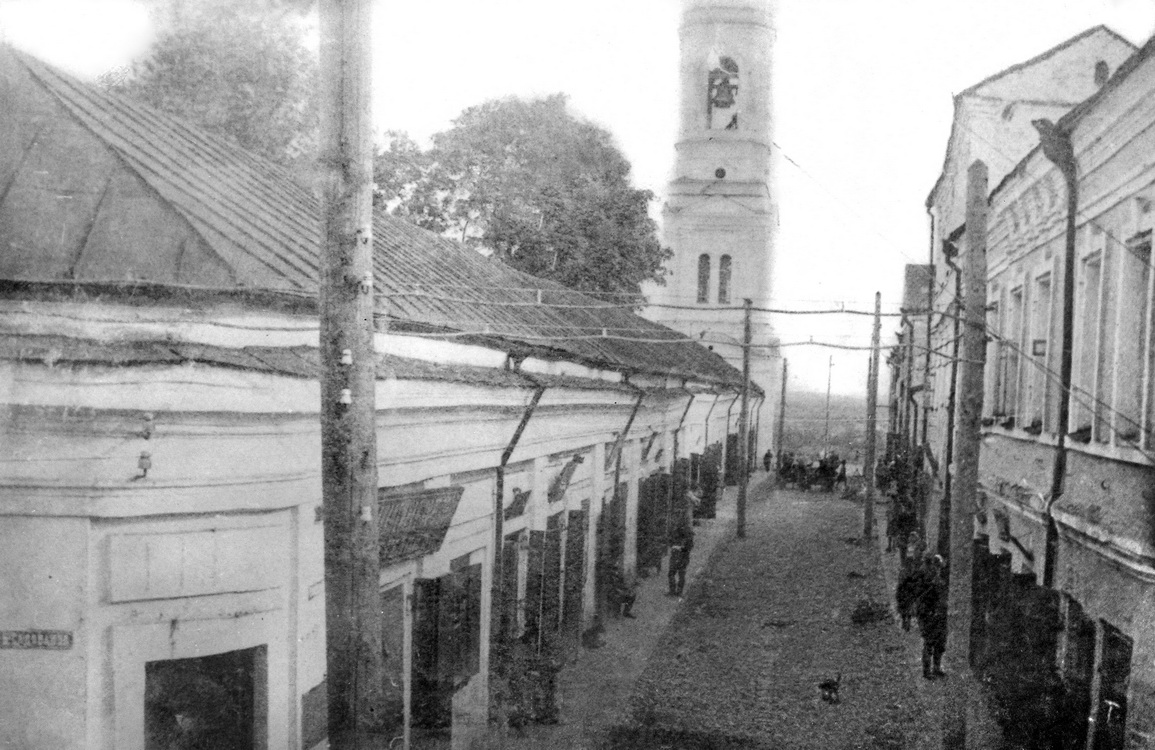 Беларуская (тарашкевіца): Магілёў (Mahiloŭ), завулак Спаскі (zavułak Spaski). Манастыр Сьвятога Спаса